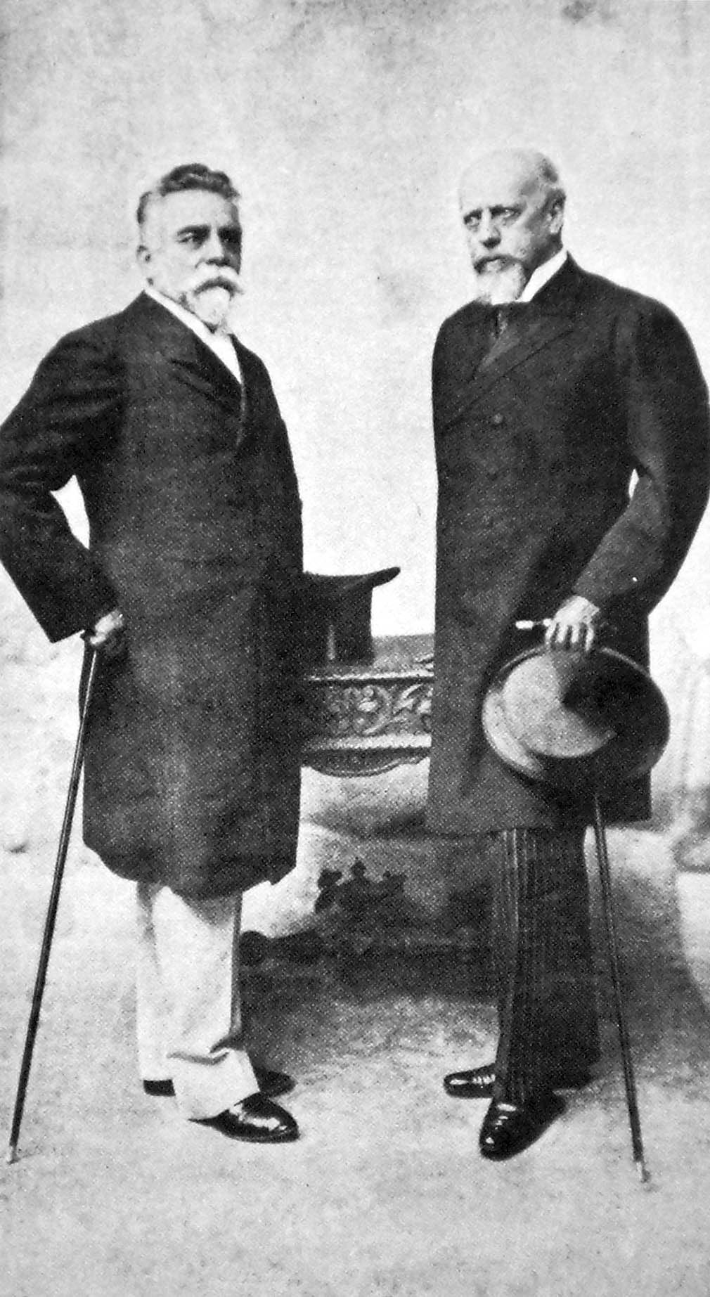 Los presidentes Campos Salles (Br) y Julio Roca (Ar)